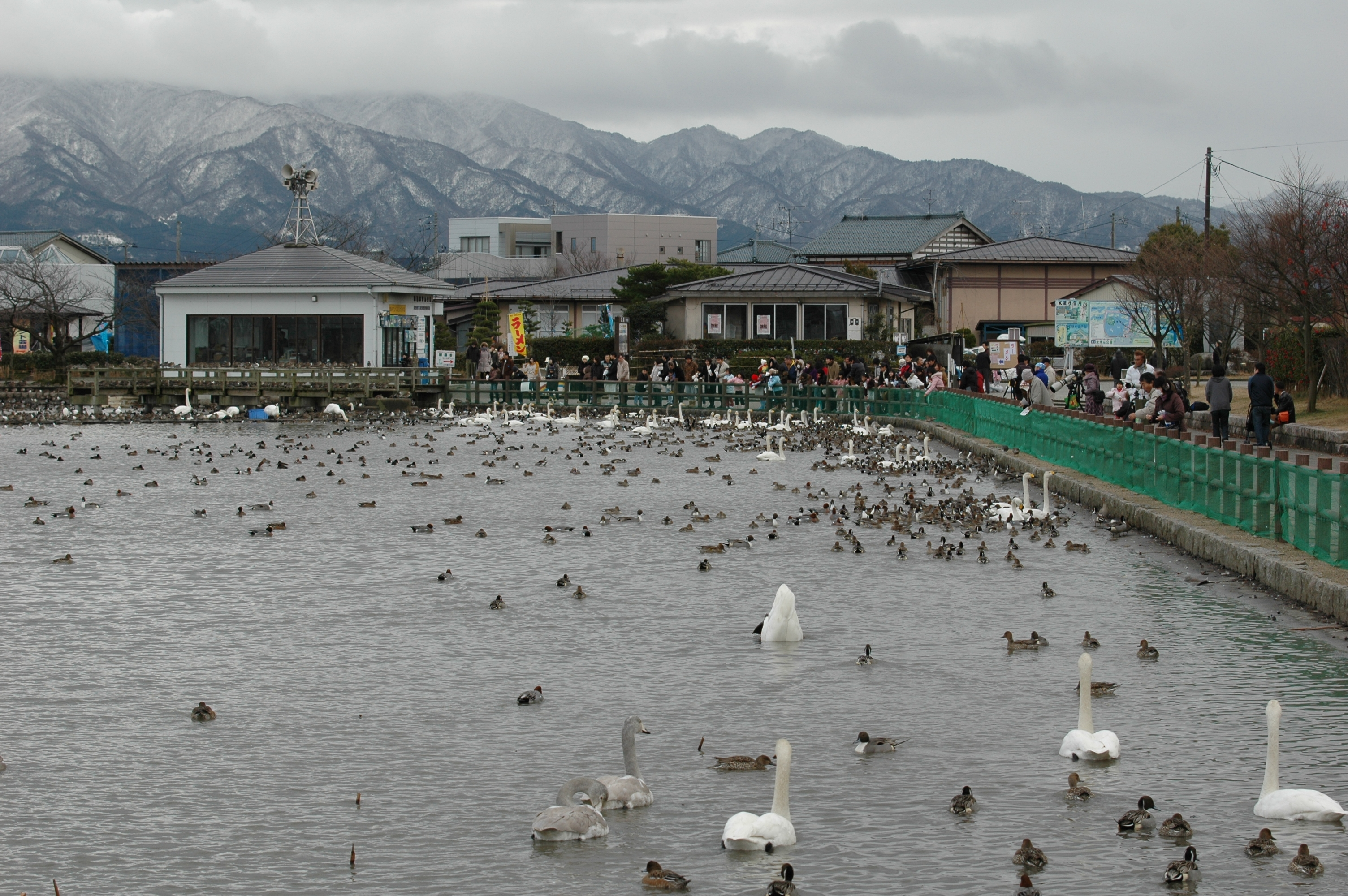 瓢湖